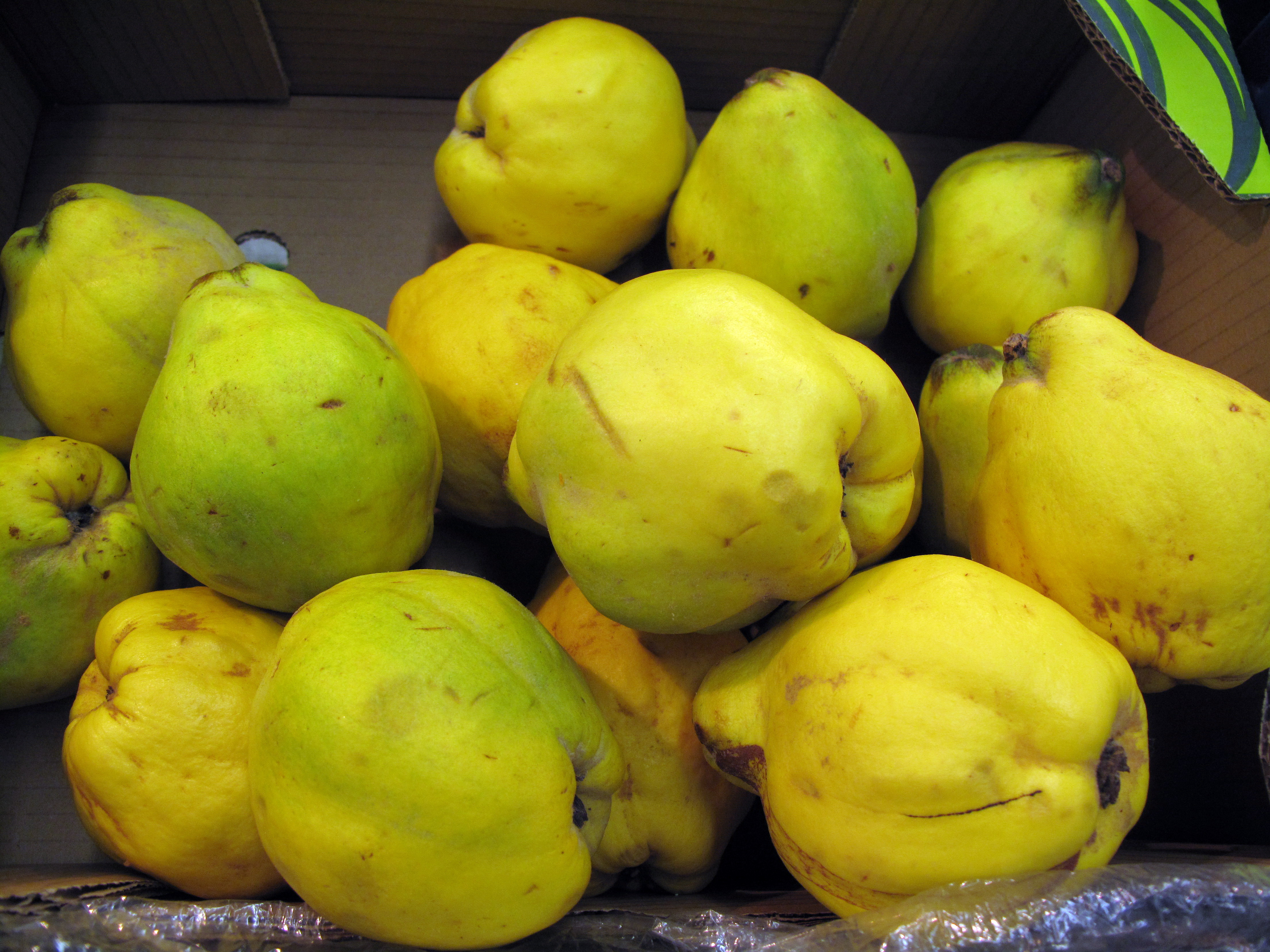 kdoule v obchodě